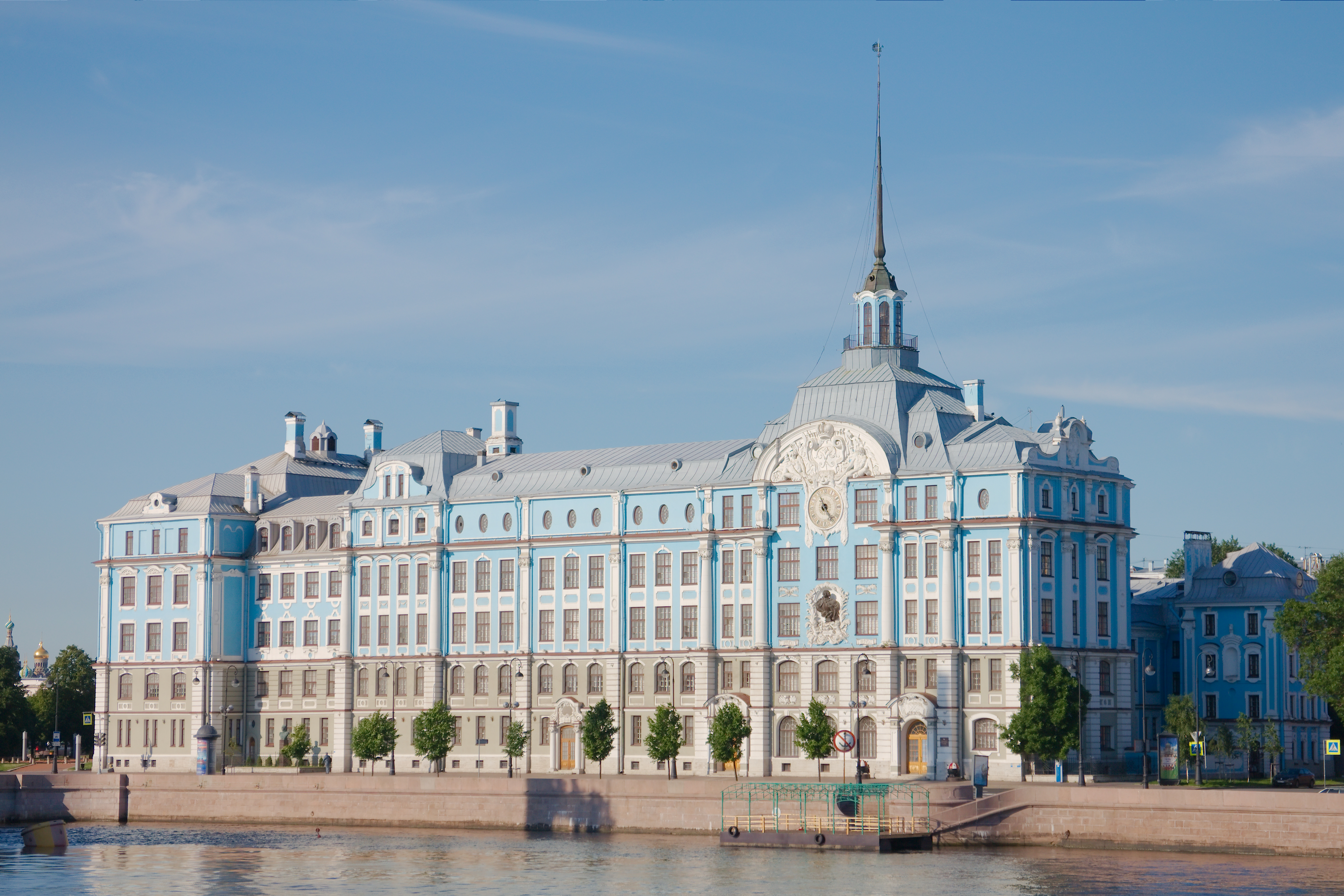 Училищный дом им. Петра Великого: Петроградская набережная, 2, Петроградский район, Санкт-Петербург